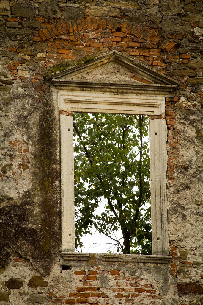 Castelul Martinuzzi (ruine), sat Vințu de Jos, comuna Vințu de Jos, Str. Eminescu Mihai 27, judeţul Alba. Datare: 1551, cu modificări ulterioare.